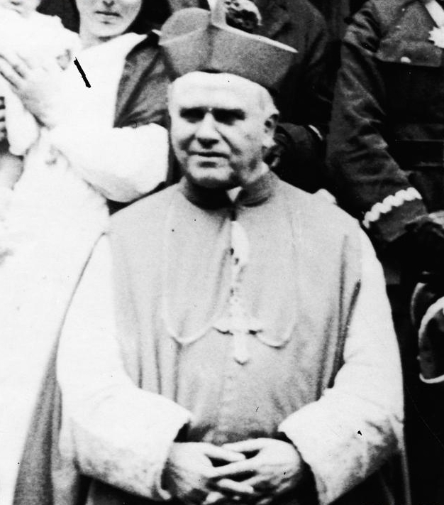 abp Jan Cieplak